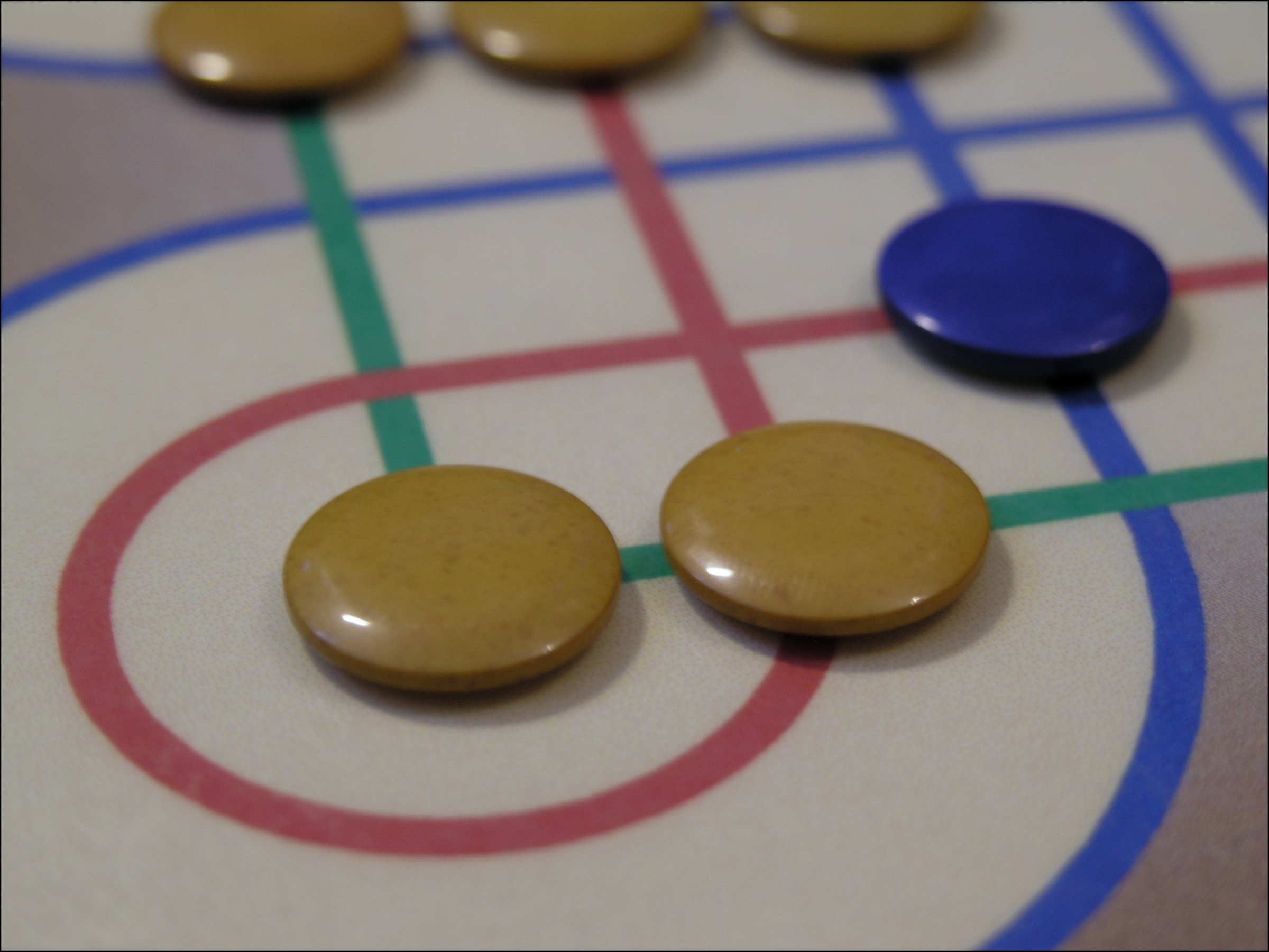 Surakarta